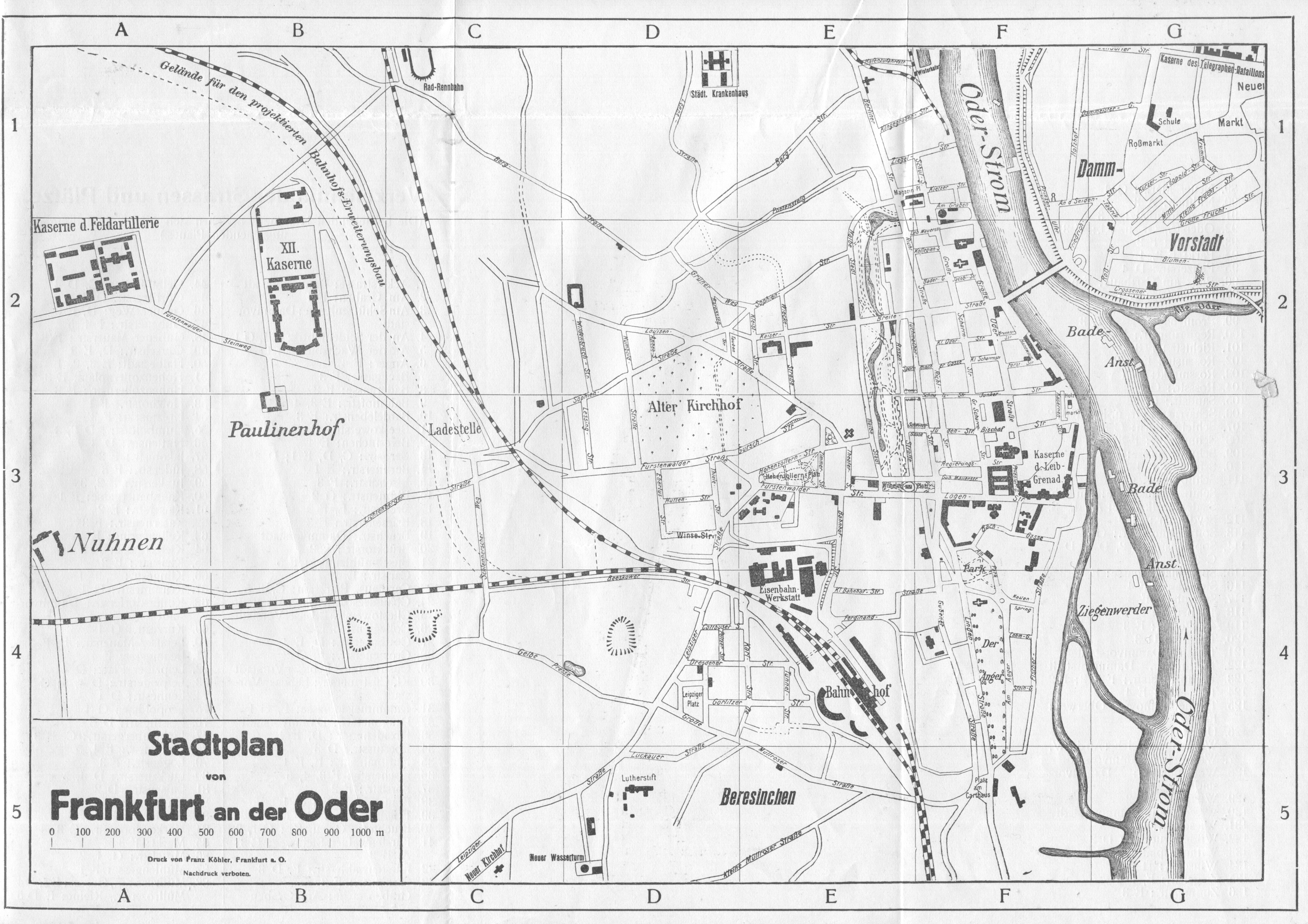 Stadtplan von Frankfurt an der Oder 1914